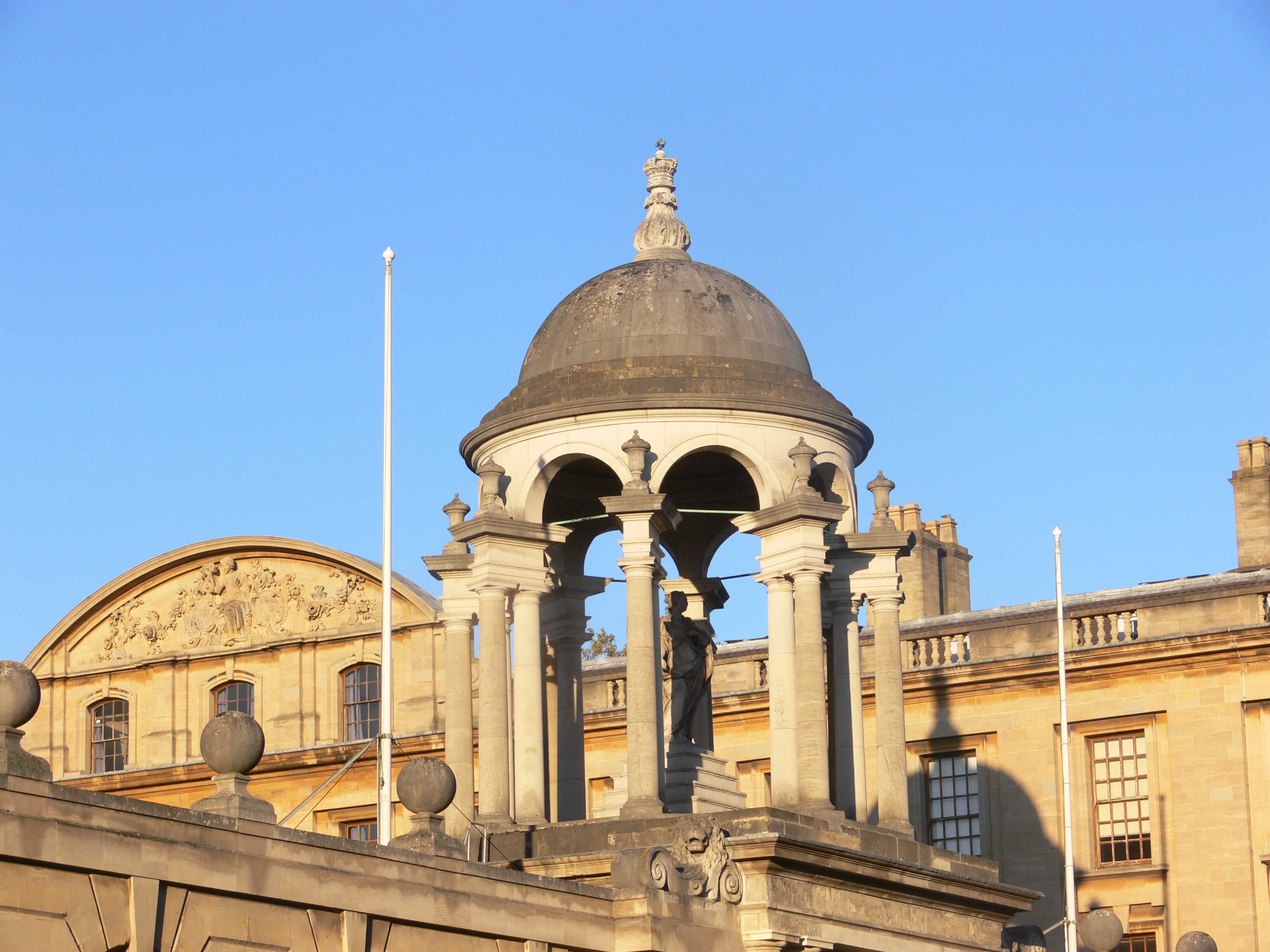 Oxford - The Queen's College - from High Street